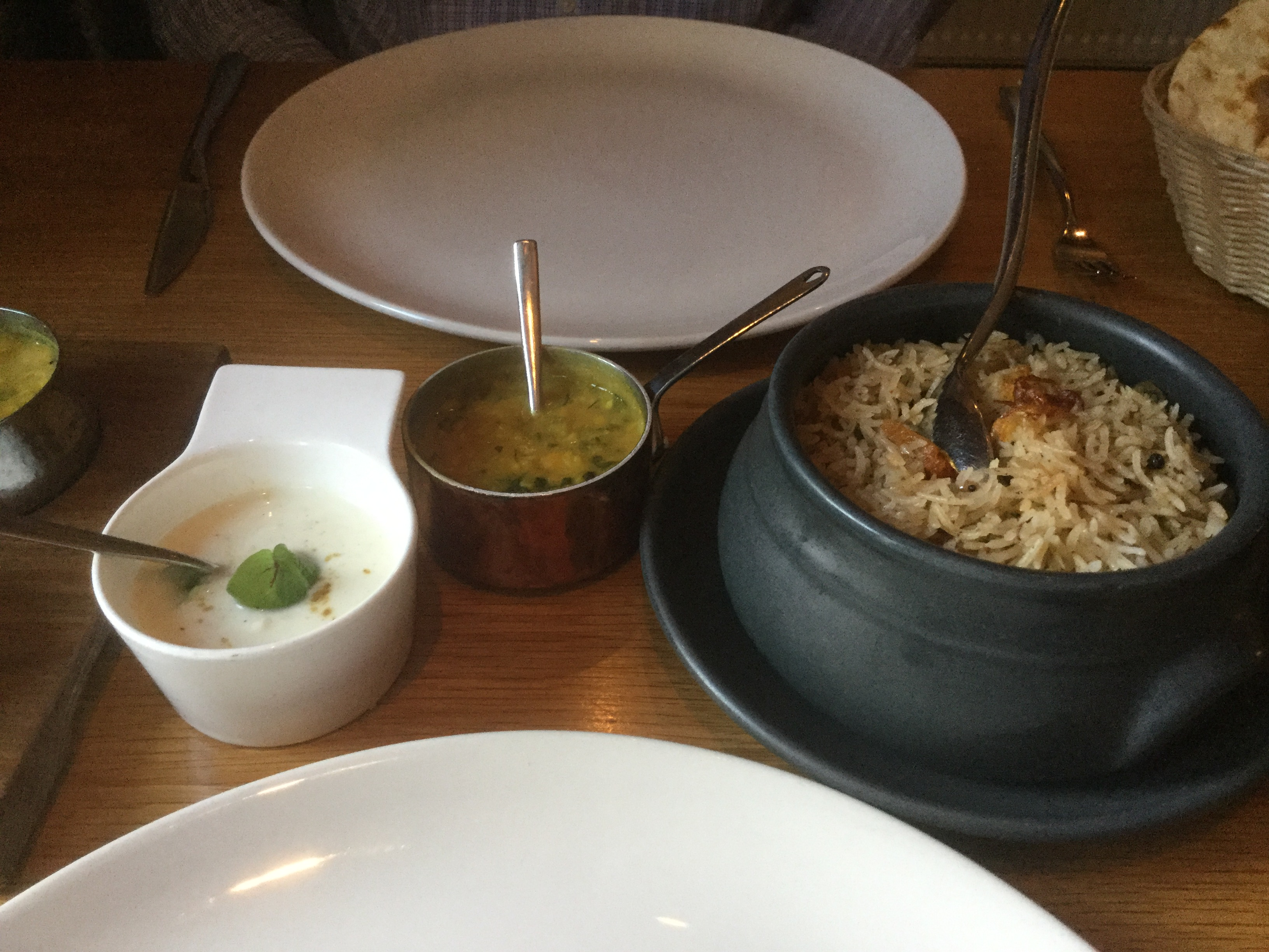 Hydrabadi Biryani with lentils and raitia, Lasan, Birmingham